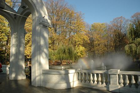 Зеркальная струя